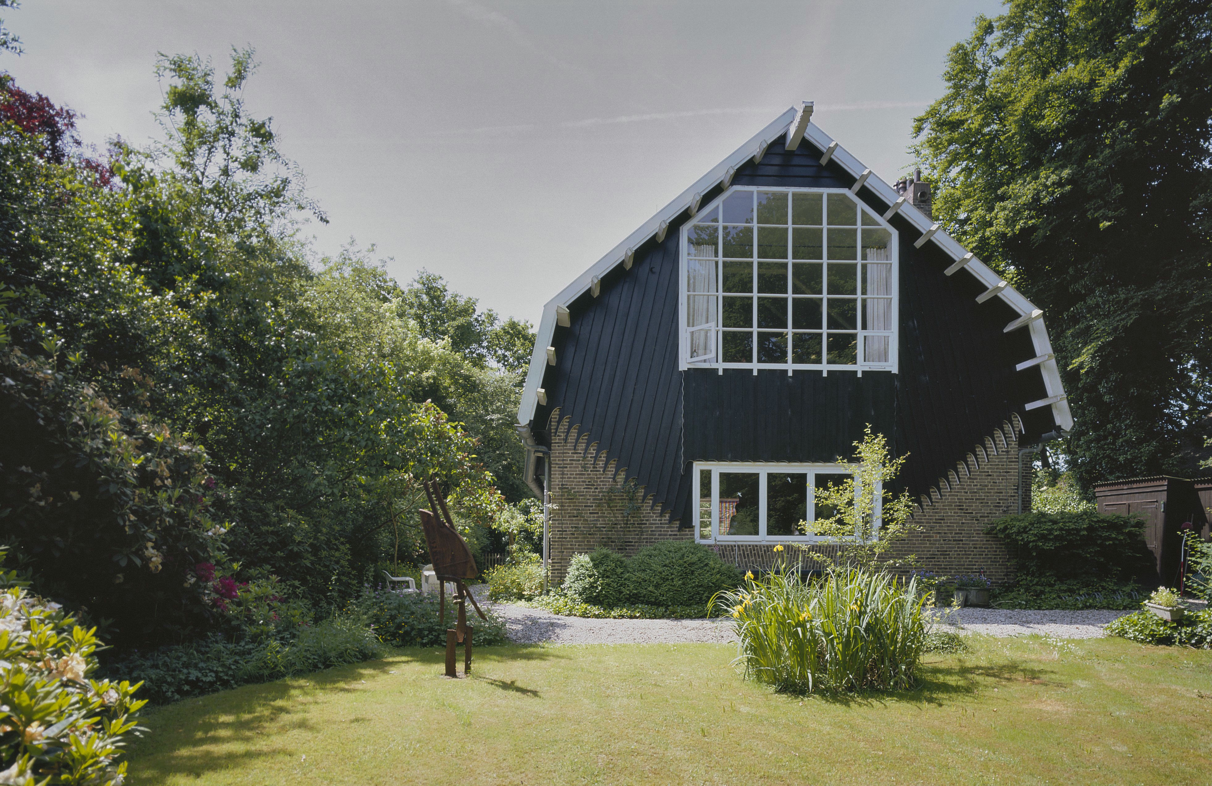 Villa De Vlerken: Overzicht van de voorgevel (opmerking: Gefotografeerd voor Bouwen in Nederland 600-2000 (2007))